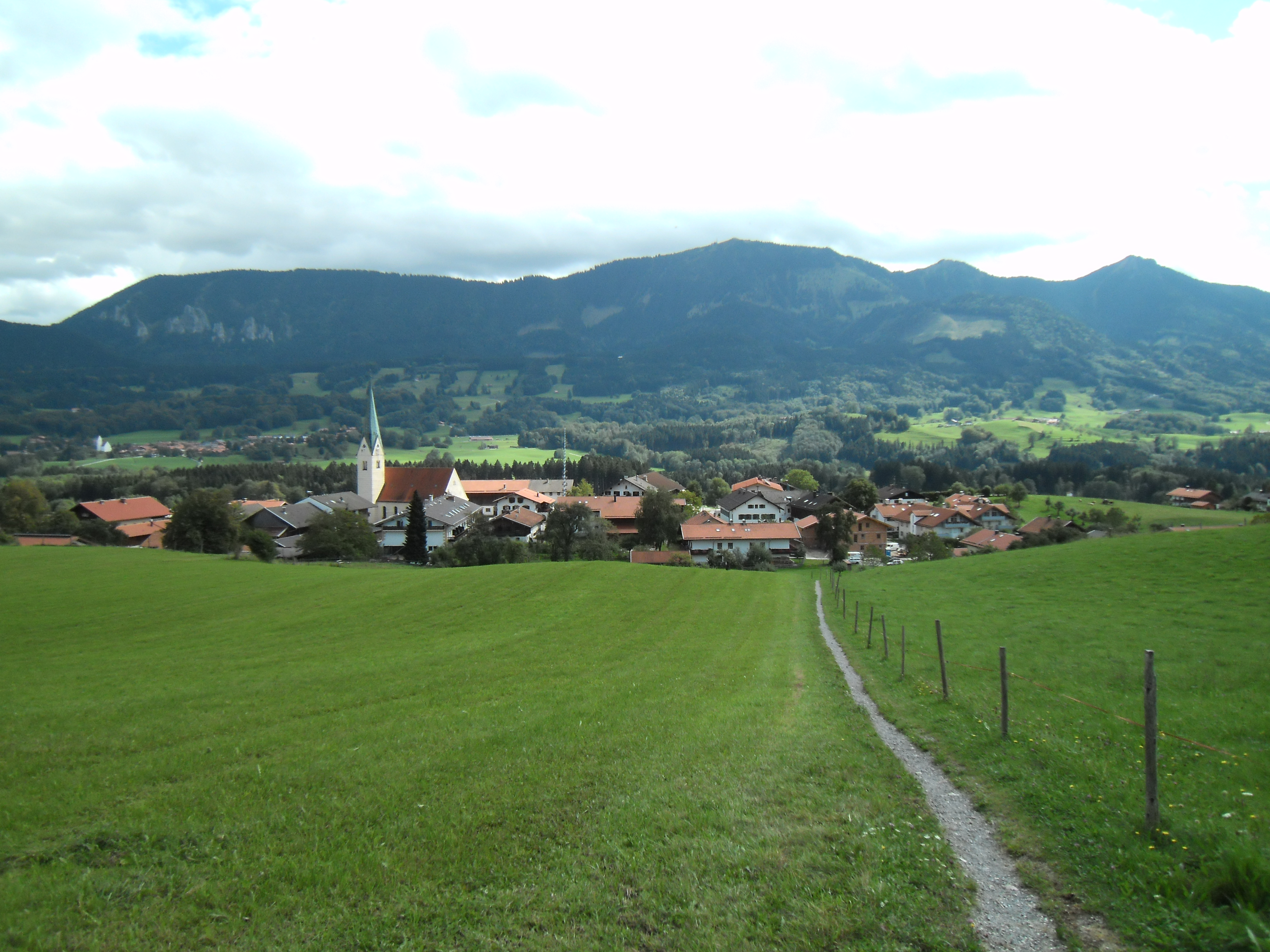 Gemeinde Samerberg (Landkreis Rosemheim, Obb.), Blick von einem grünen Hang auf den Gemeindeteil Törwang, im Hintergrund die Hochries.